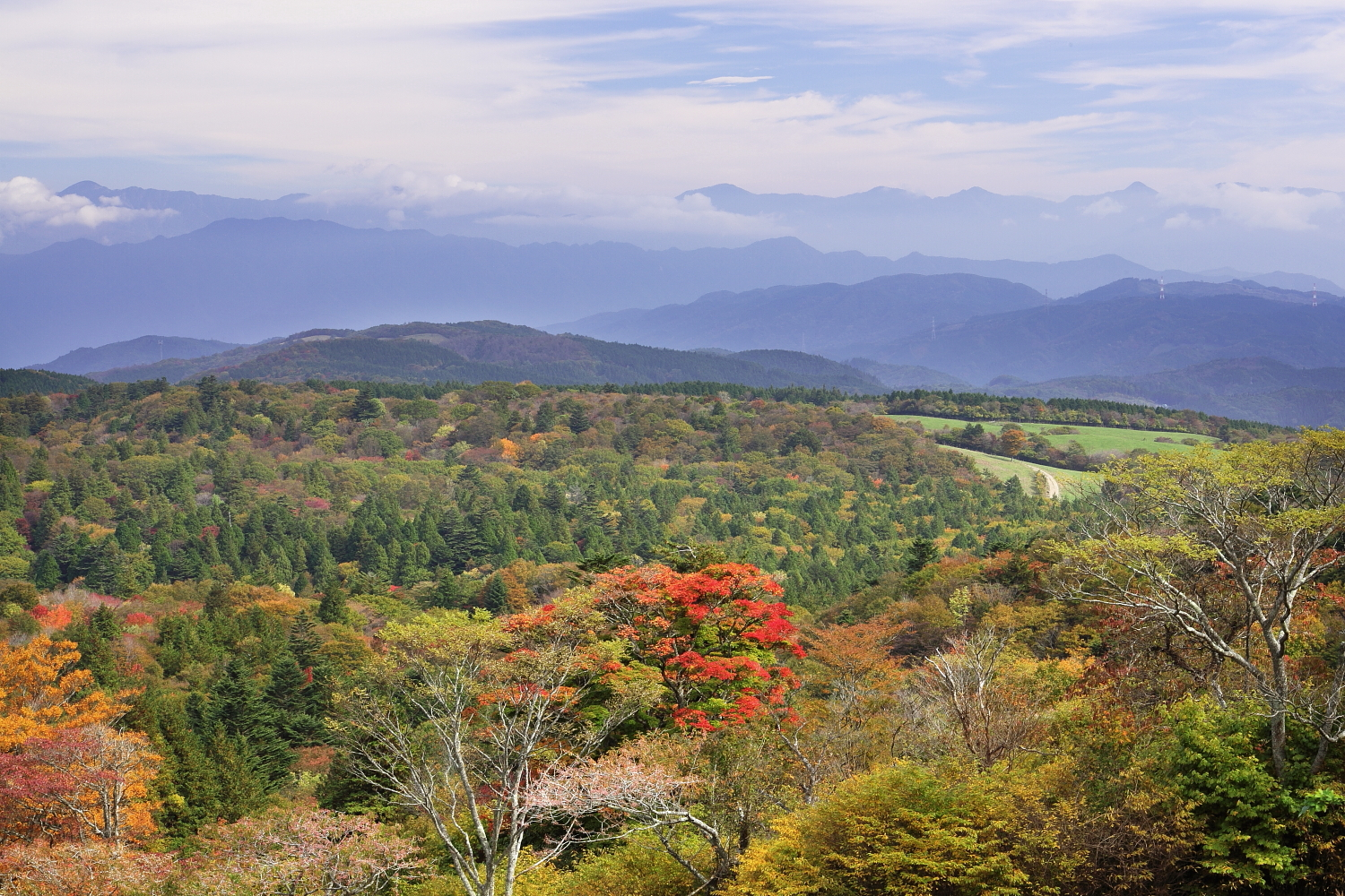 茶臼山高原（下伊那郡根羽村小戸名、2010（平成22年）10月）